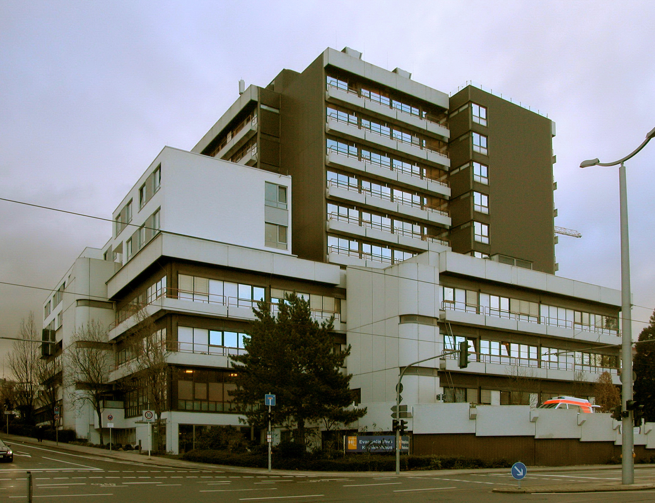 Evangelisches Krankenhaus, Mülheim an der Ruhr, von NW gesehen Kamera-Position: Friedrichstraße